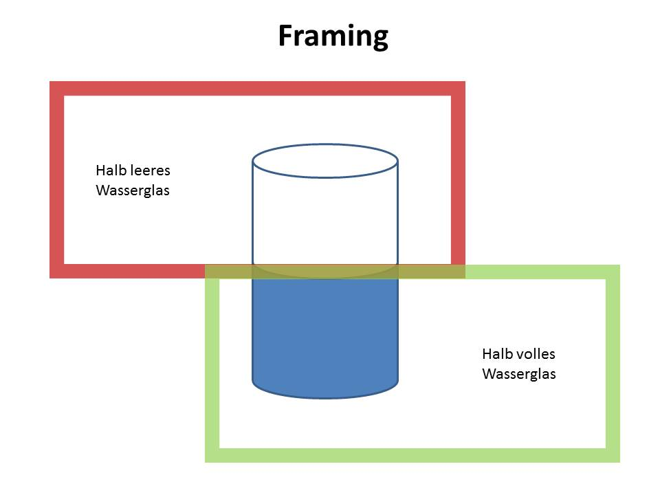 Am Beispiel eines halb vollen bzw. halb leeren Wasserglases wird das Prinzip des Framing (Rahmung) veranschaulicht.